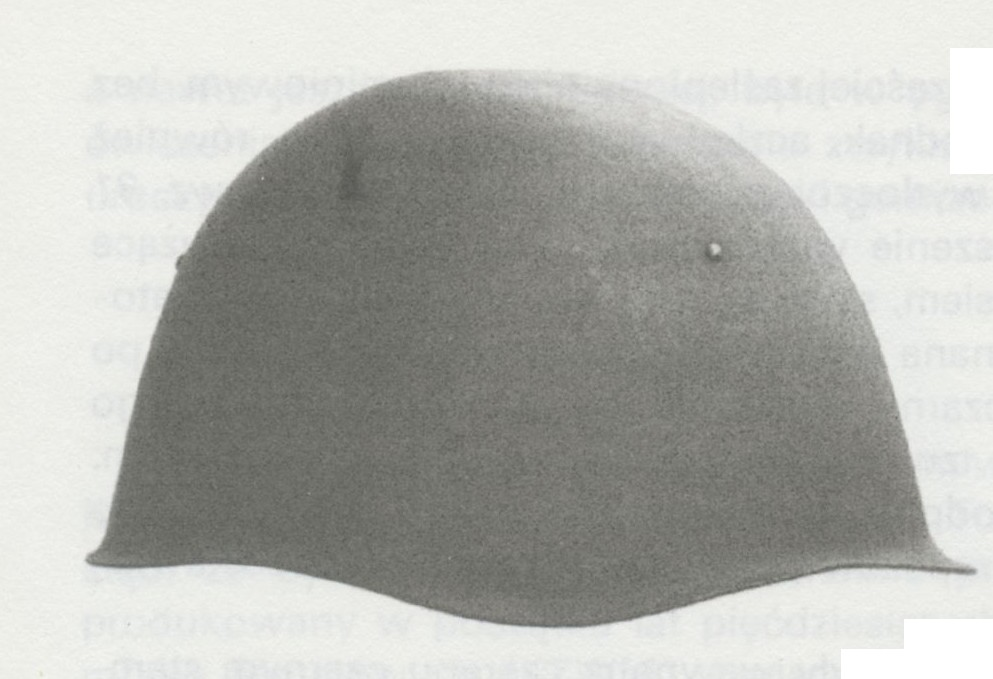 Hełm polski wz. 50 widok z boku